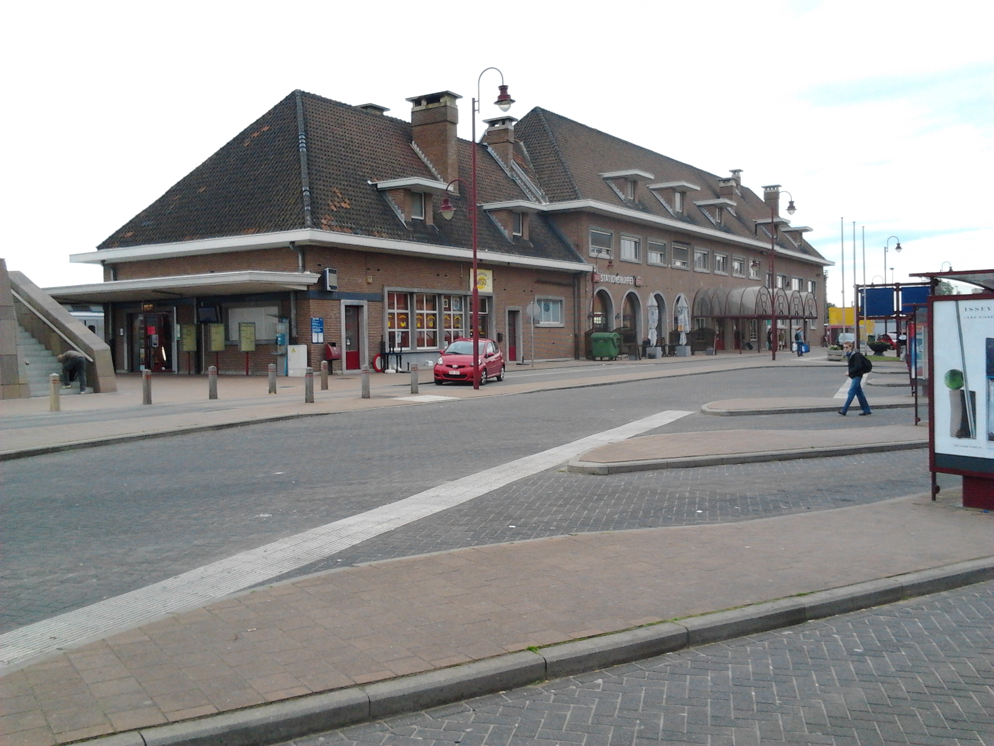 Het spoorwegstation van Aarschot in juni 2012